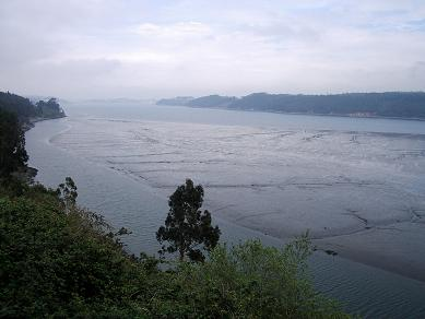 Vista da ría de Ribadeo. En primeiro termo, a zona ZEPA. Tomada por A. Gregorio o 2/4/05 Uploader: Antonio Gregorio